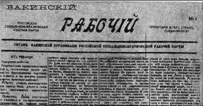 Bakınskiy Raboçiy ilk sayısı 1906